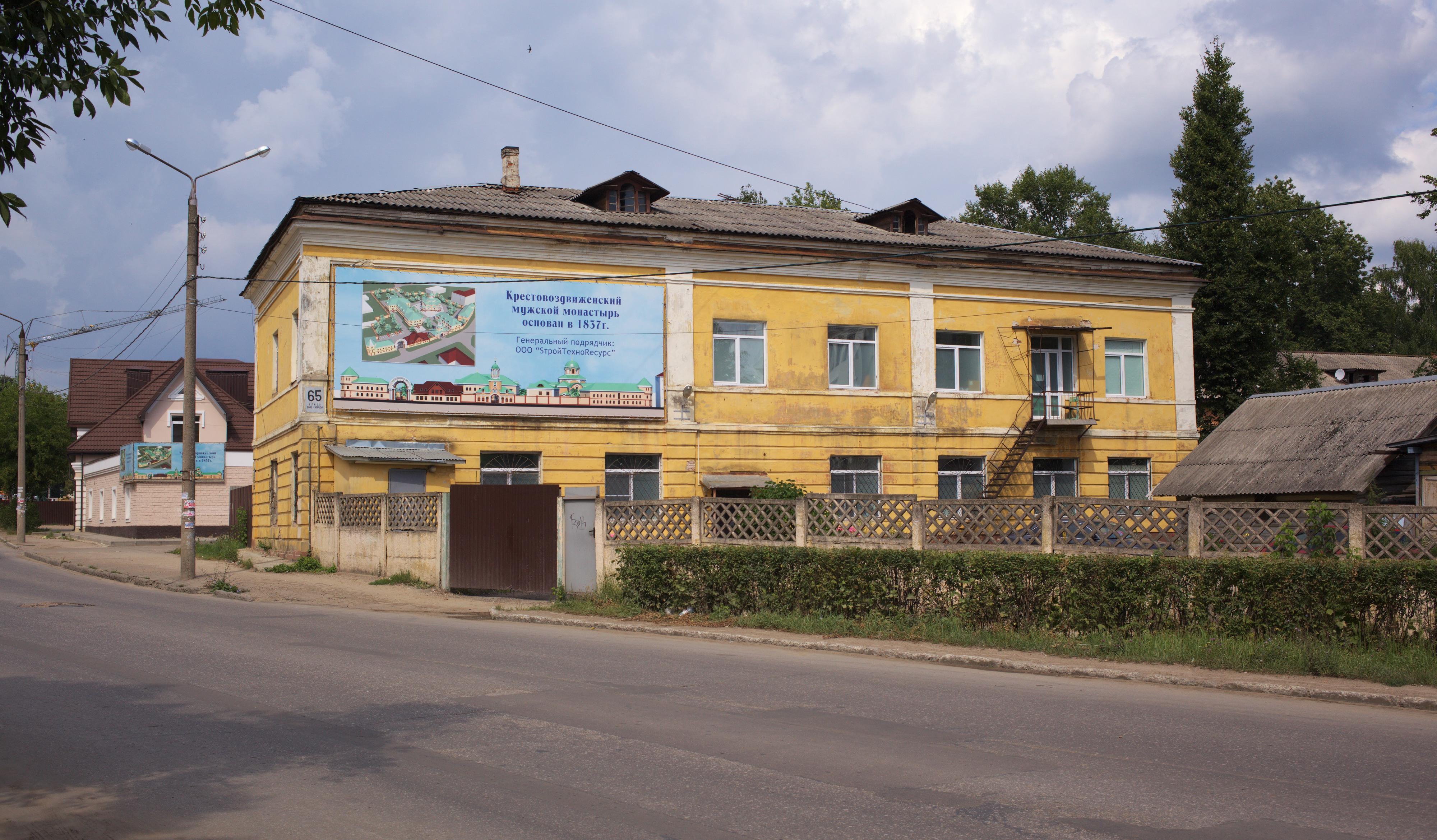 Калуга, остатки Крестовоздвиженского монастыря